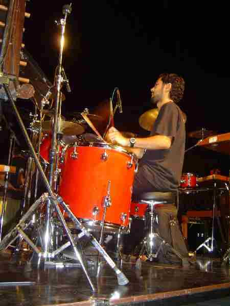 Concierto en Figueres concierto en Figueres el 26 julio 2006, ciclo “Teatre,Música i Dansa a la Fresca 2006” Percujove Drum set by Honsuy Percussion